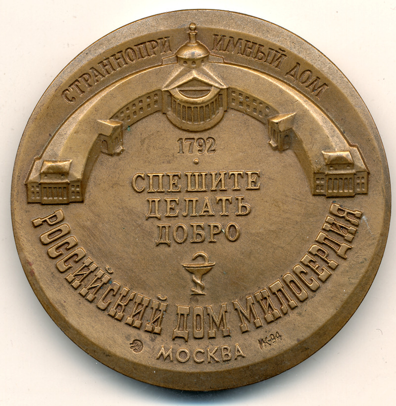 Vue de l'hôpital Cheremetev